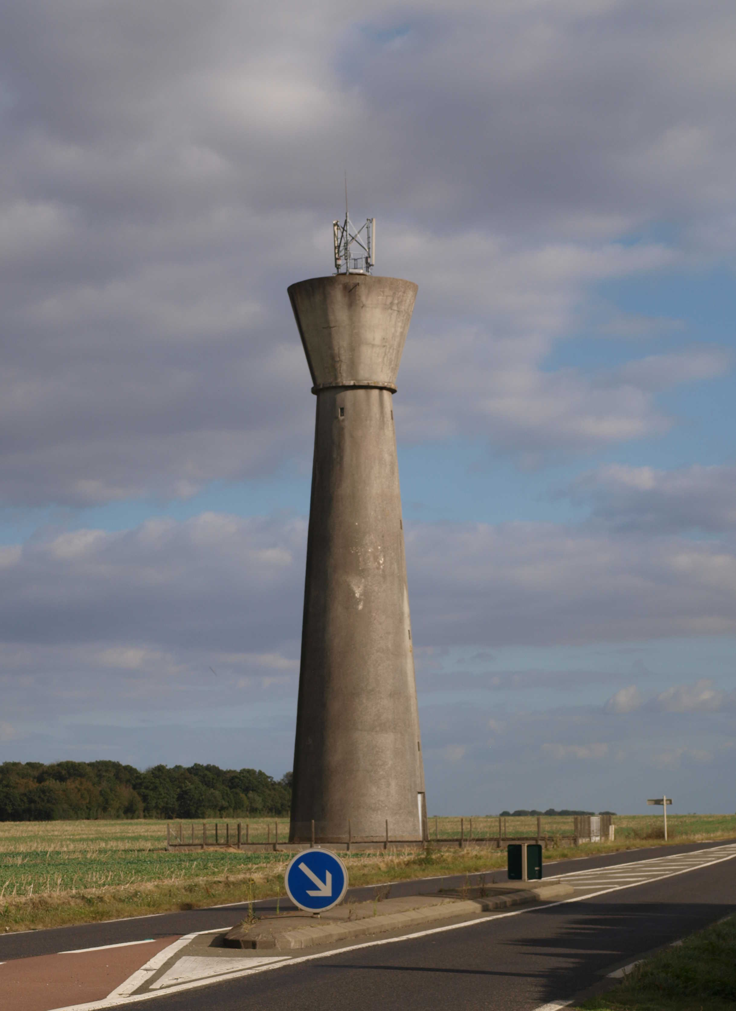 Gohory (Eure-et-Loir) ; le château d'eau